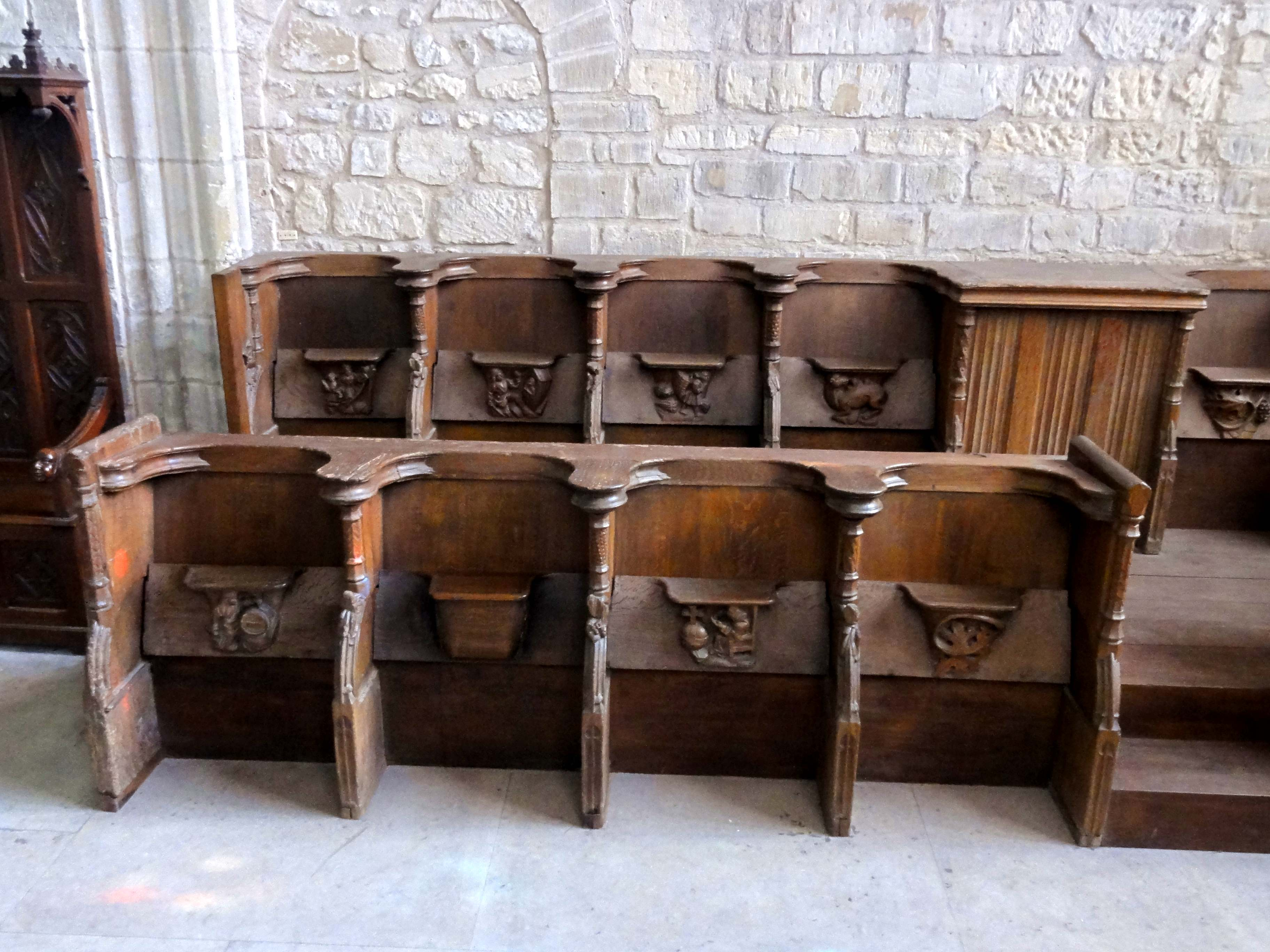 Stalles côté nord (1 à 4 et 21 à 24).